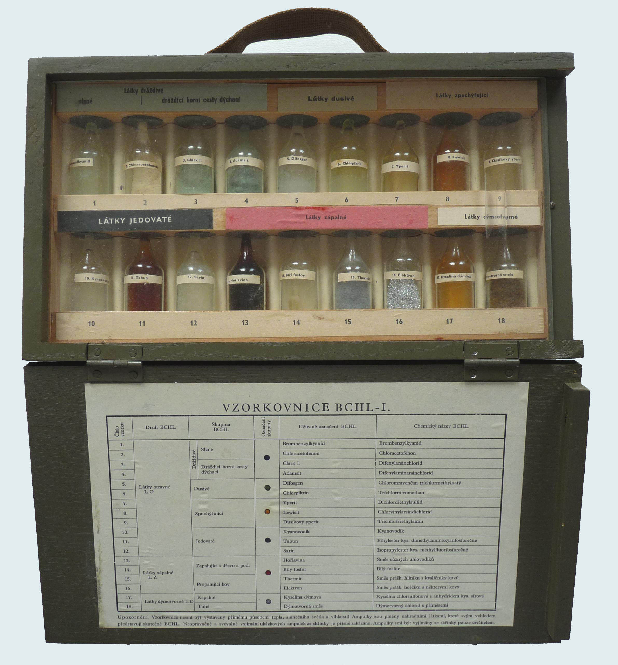 Vzorkovnice BCHL I vnitřek